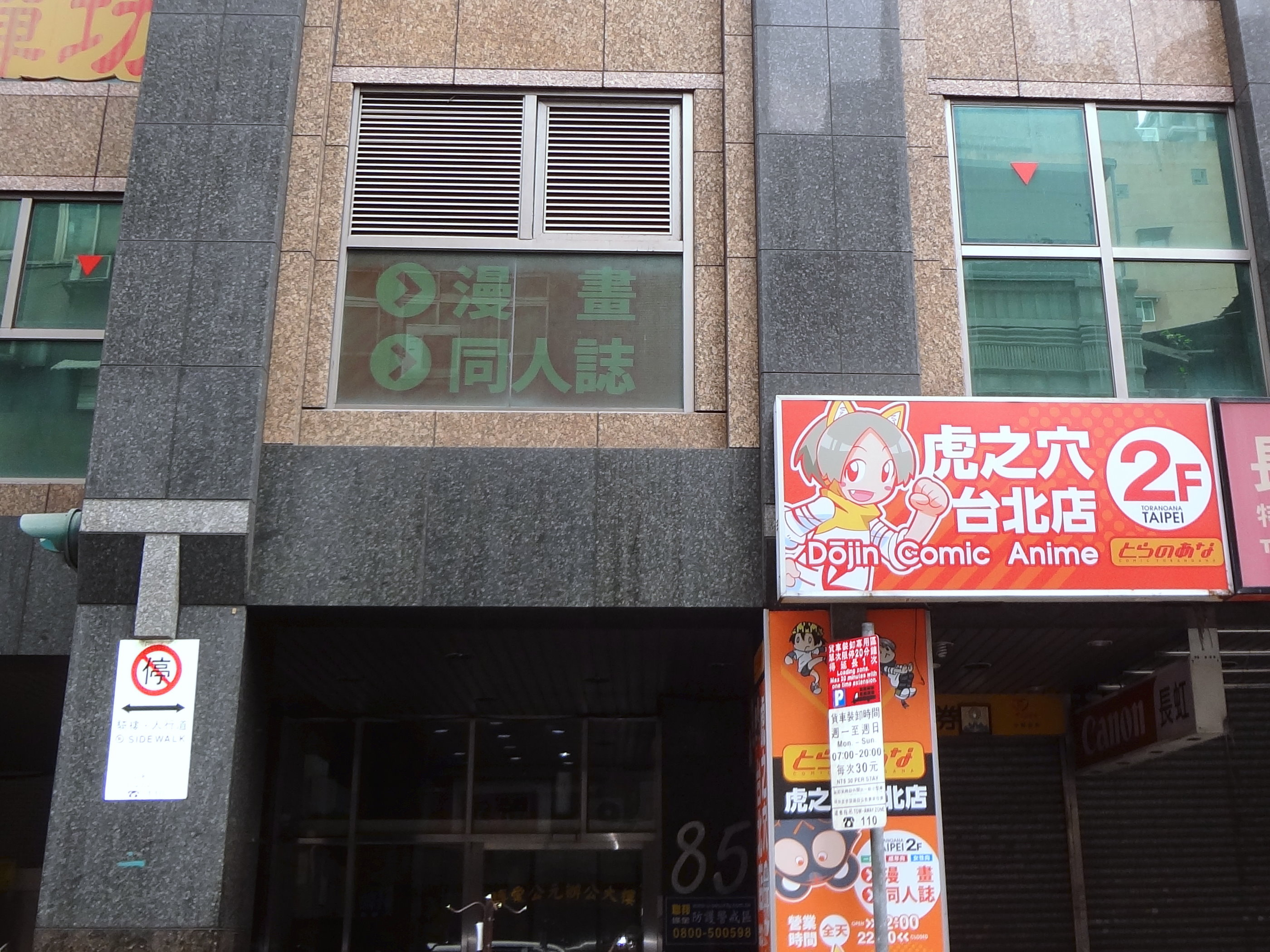 中文（台灣）: 虎之穴台北店，位於臺北市中正區漢口街一段85號2樓（博愛公元辦公大樓），2018年3月23日開幕。